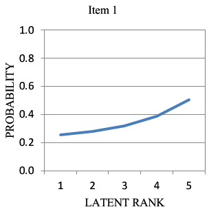 IRP of Latent Rank Theory